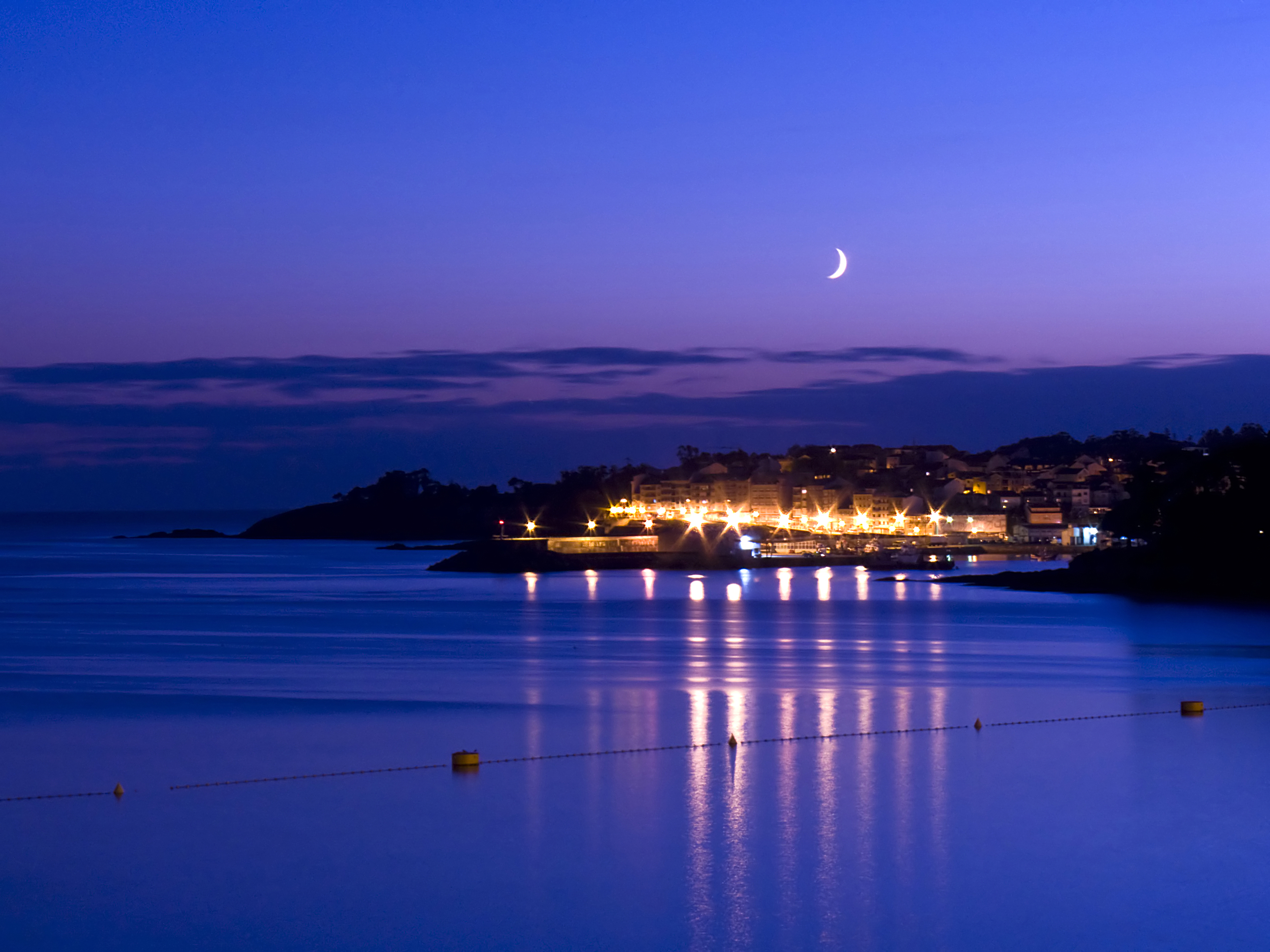 Unha foto de Portonovo (Portonovo, Adina, Sanxenxo) de noite, feita a finais de setembro.